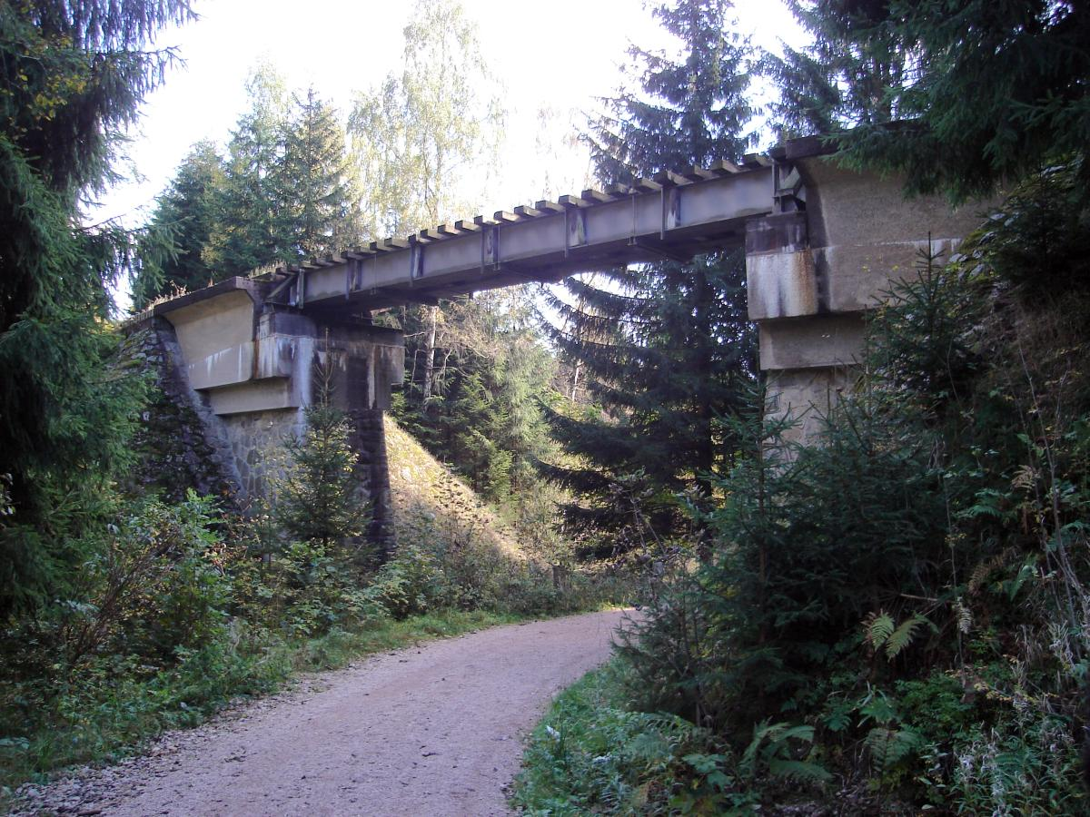 Schindangerbrücke der Schmalspurbahn Wilkau-Haßlau–Carlsfeld